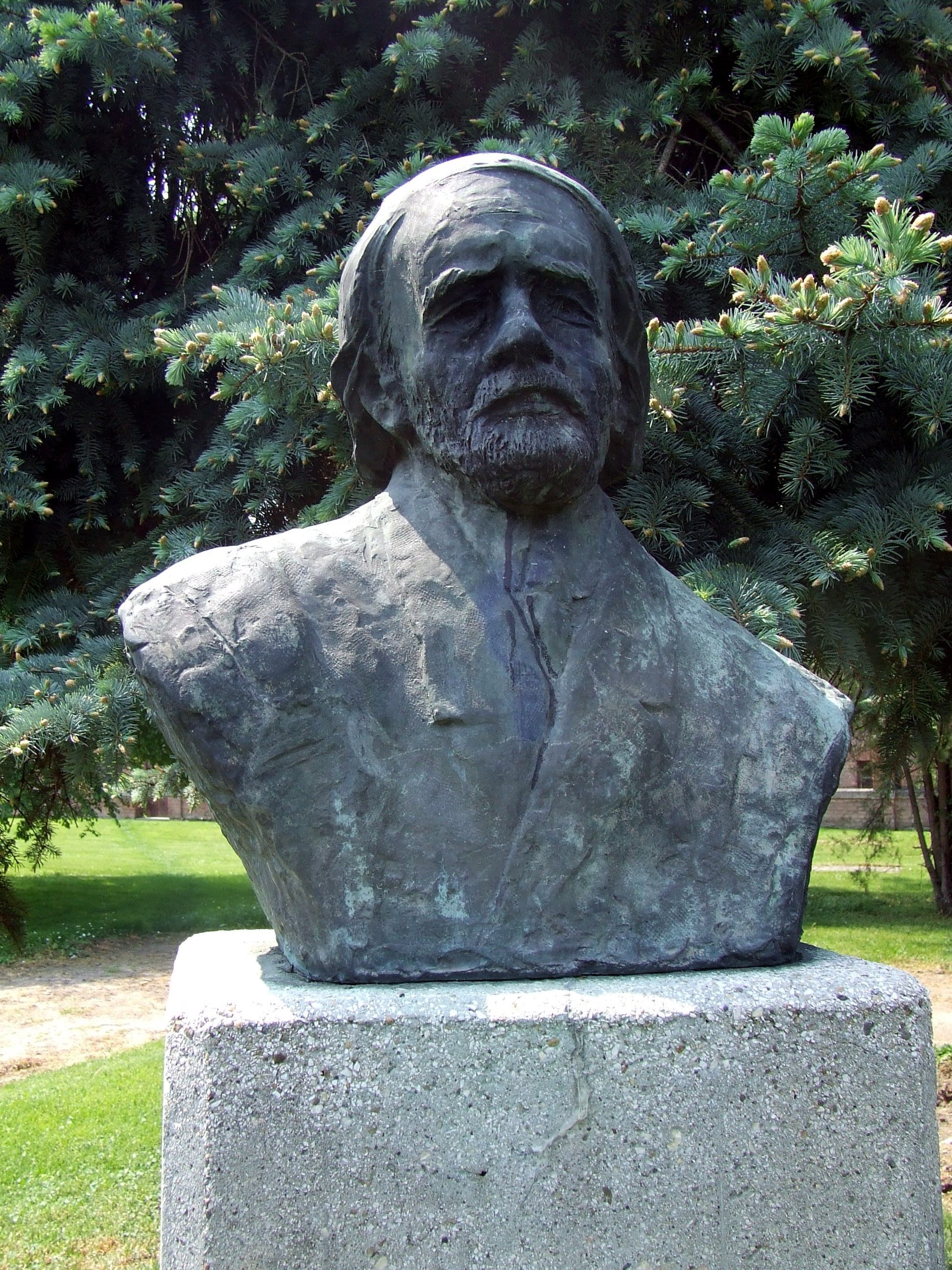 Kodály Zoltán mellszobra Mohácson. (Hősök Parkja). Borsos Miklós alkotása (bronz, 1984)